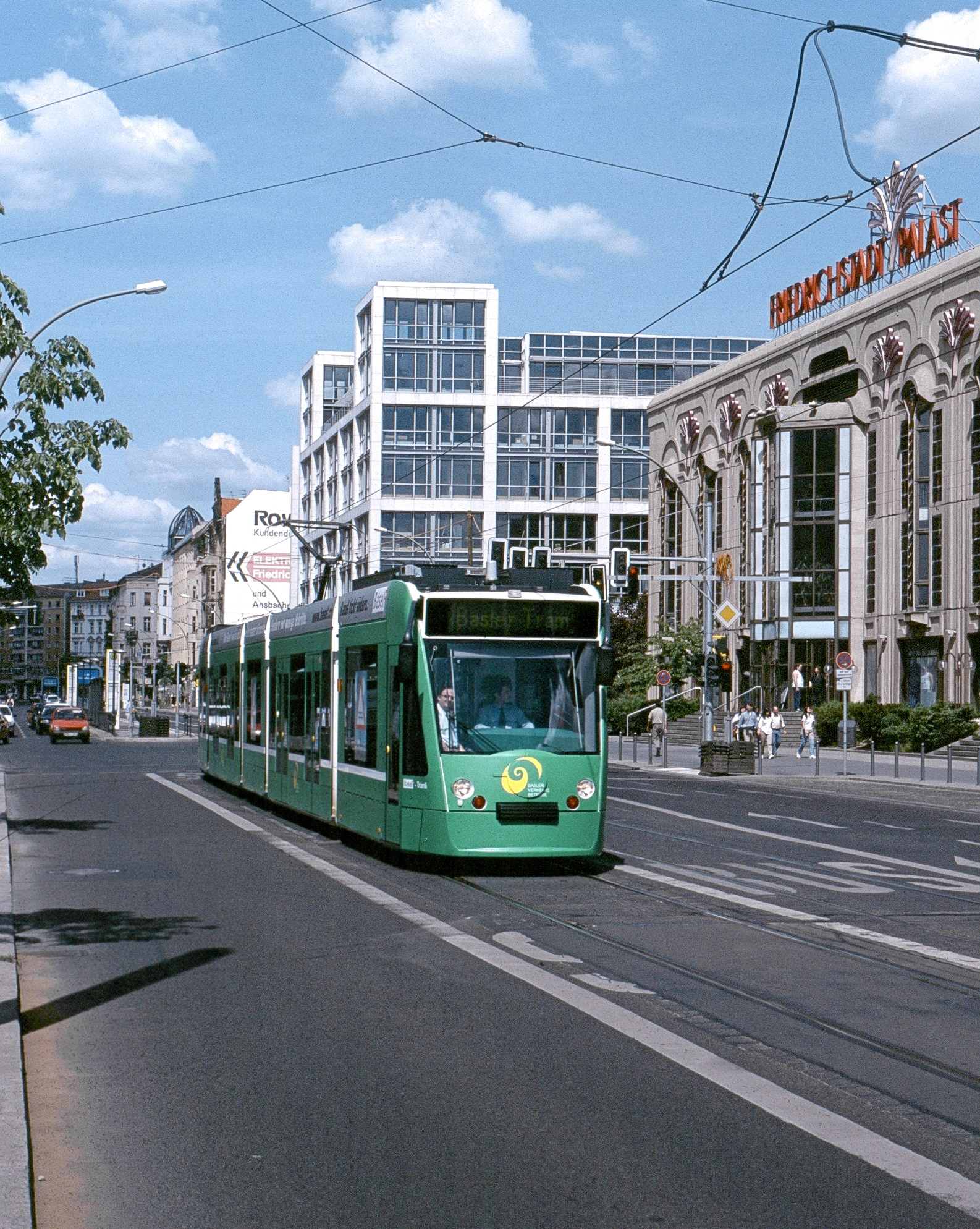 Potsdamer Combino in Basler Farben in Berlin Friedrichstraße